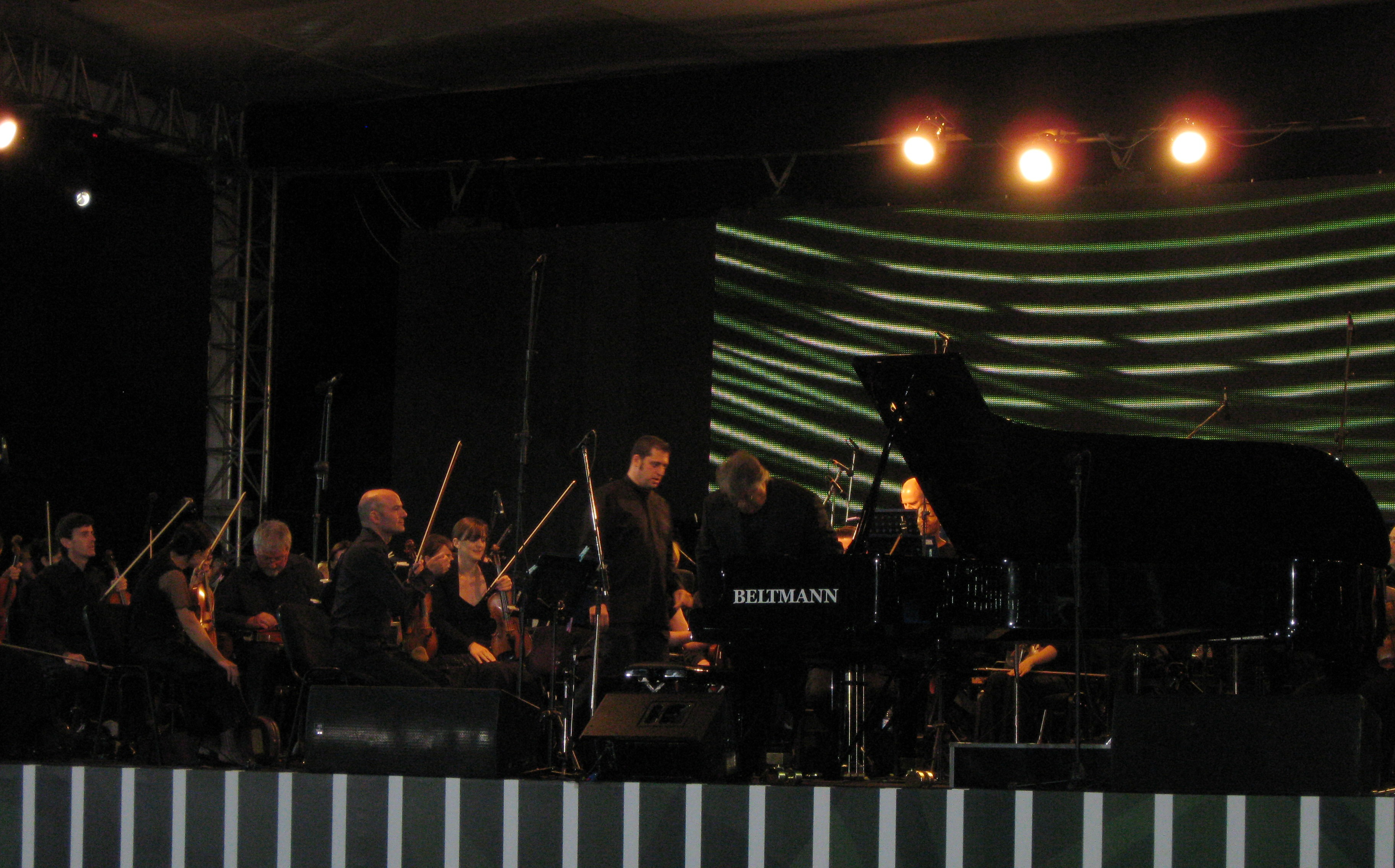 Музыкальный фестиваль в Габале.